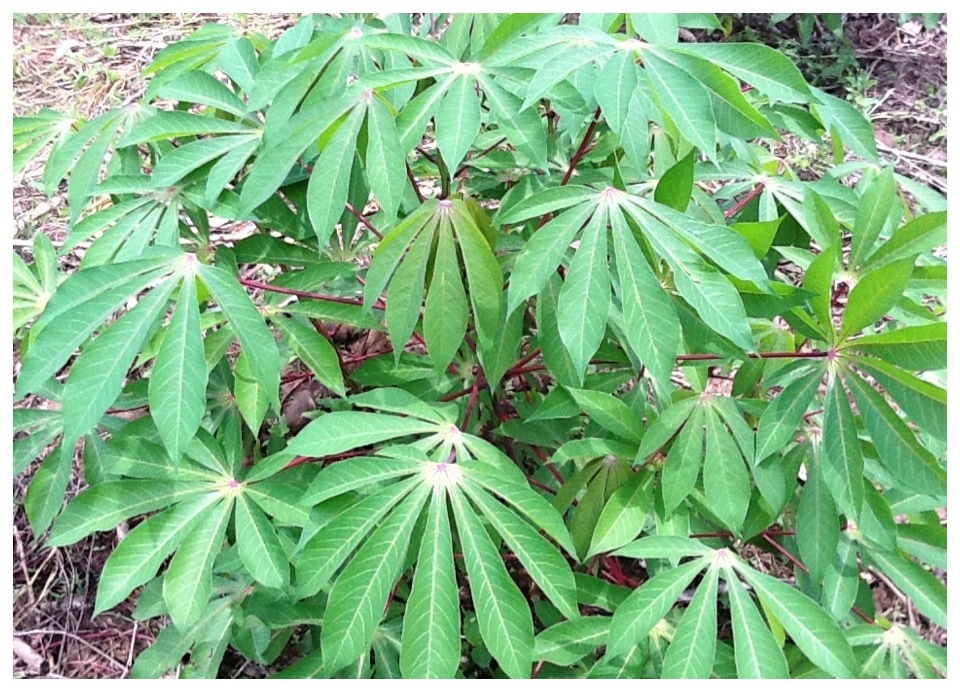 Plants de cassave (manioc)